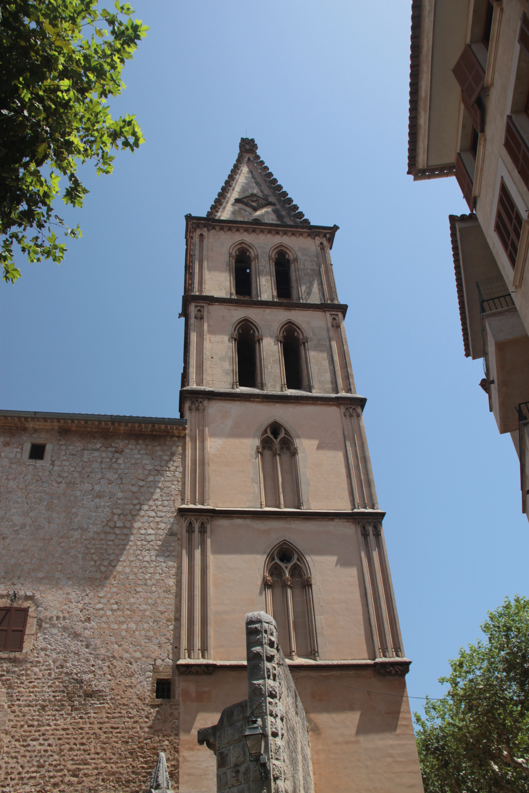 Церква святого Варфоломія (Церква Сант-Бартомеу), Сольєр, Мальорка, Іспанія.